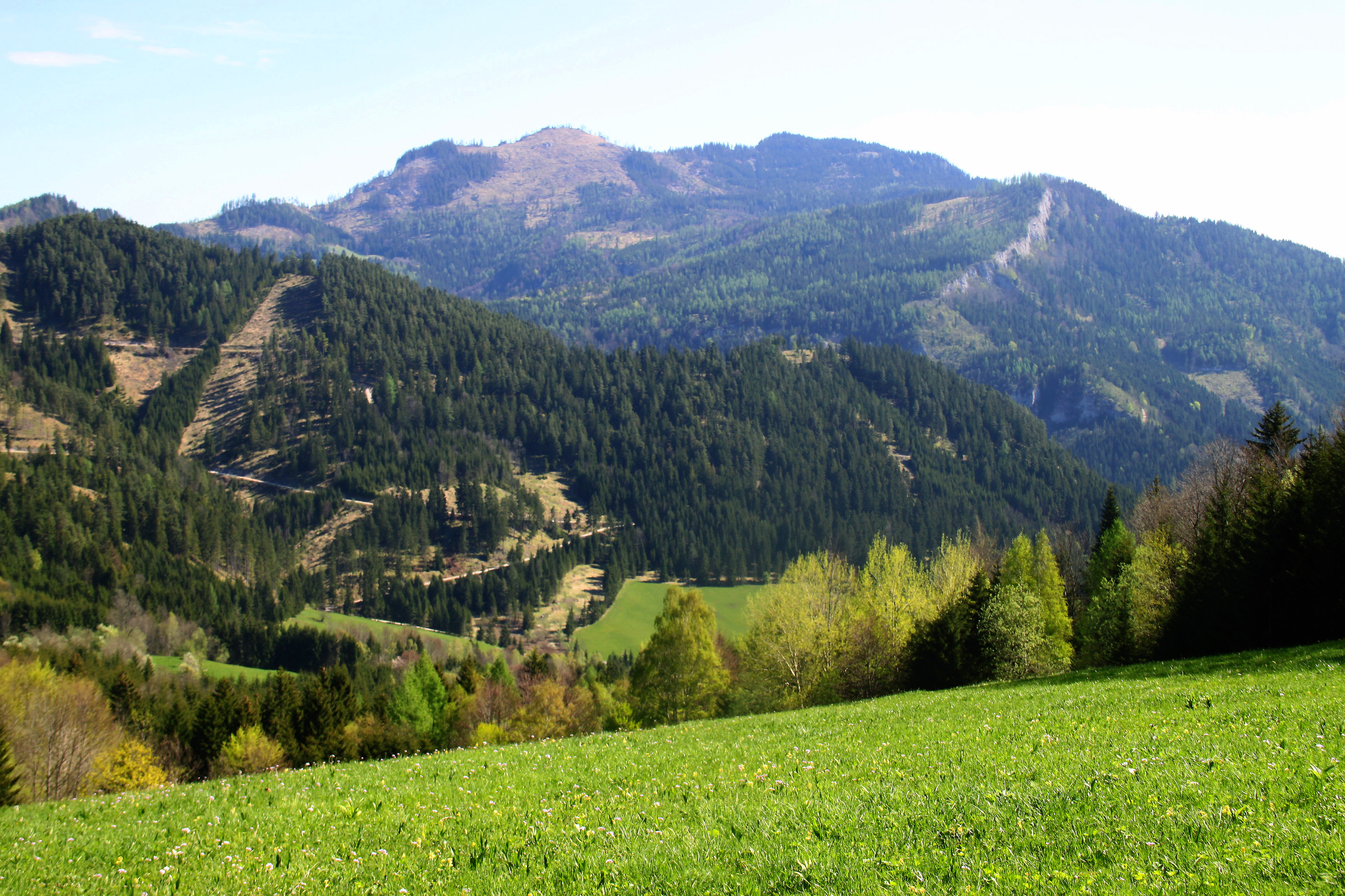 Handlesberg von Südwesten (Gehöft Obersberger), der Handlesberg-Gipfel ist die bewaldete Erhebung rechts der Mitte, rechts darunter die Lange Wand, links (mit Kahlschlag oder Windwurf) die Rückseite der Freudentaler Mauer, im Vordergrund links der Hirschkogel